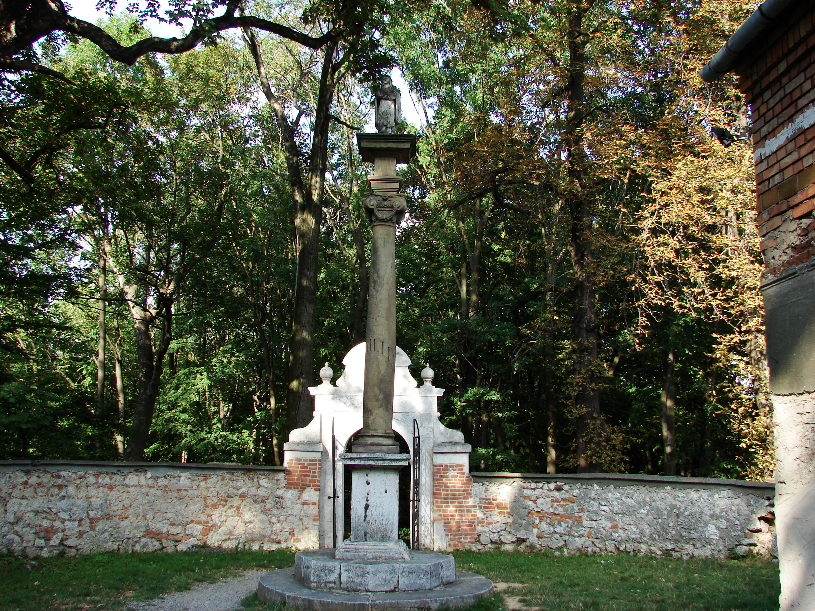 Kolumna w Grodzisku na zachód od Skały